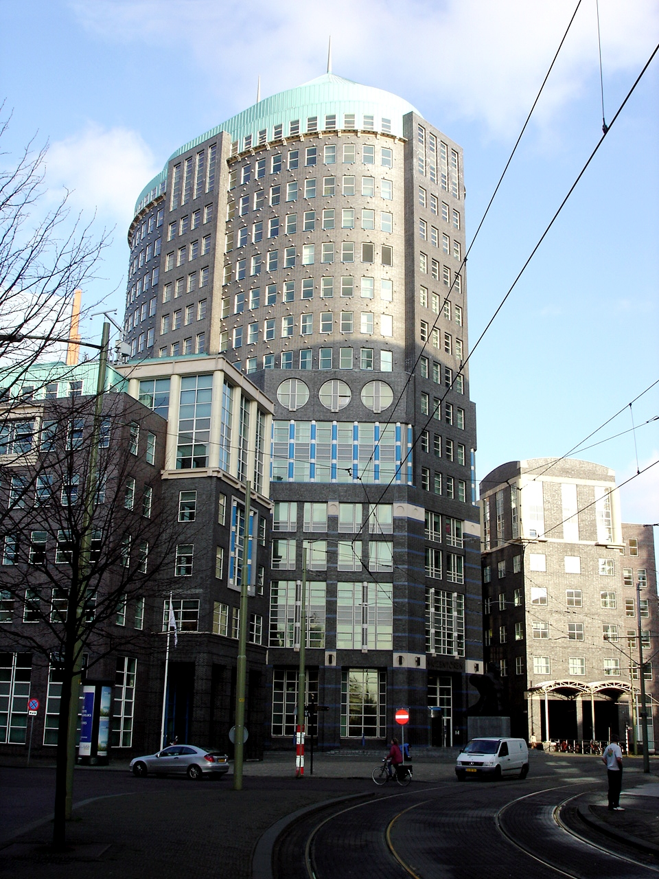 Zelfgemaakte media